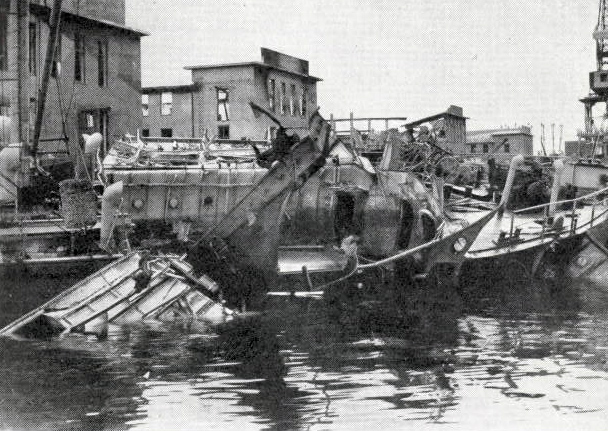 Fra informasjonsbrosjyre utgitt av daværende Trondheim Havnevesen i 1953: «Allierte bombefly gjestet et par ganger de tyske militæranlegg i Østhavna. Fotografiet ovenfor viser et parti ved Ladehammerkaia etter det amerikanske angrep 24. juli 1943. For øvrig var havna under krigen utsatt for intens og tung trafikk, mens alt vedlikehold ble forsømt.»